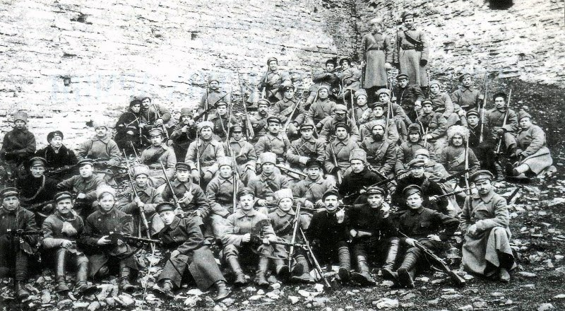 Беларуская (тарашкевіца): Атрад Станіслава Булак-Балаховіча ля сьценаў Ізборскай крэпасьці, кастрычнік-лістапад 1919